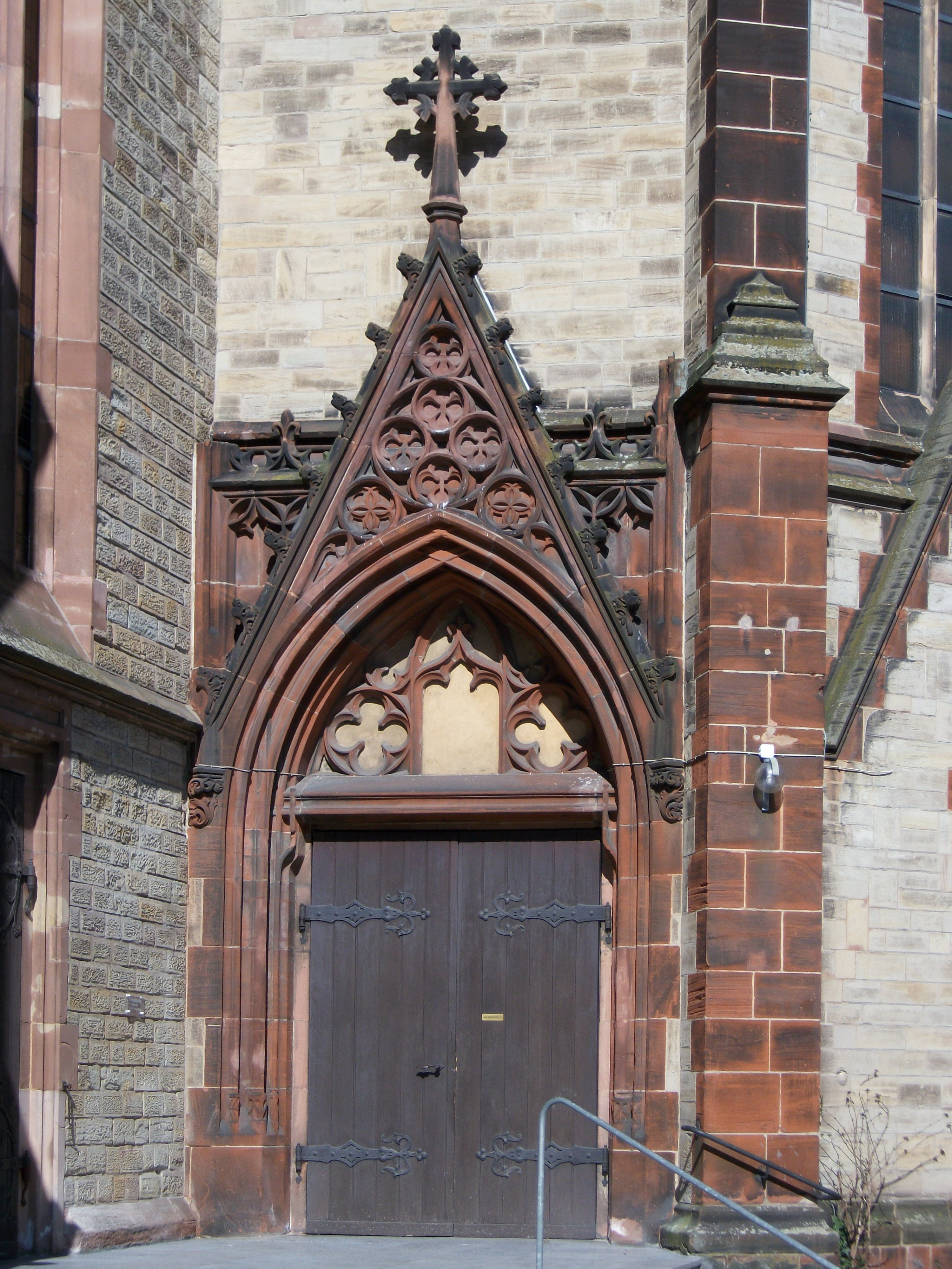 St. Jakob (Saarbrücken)